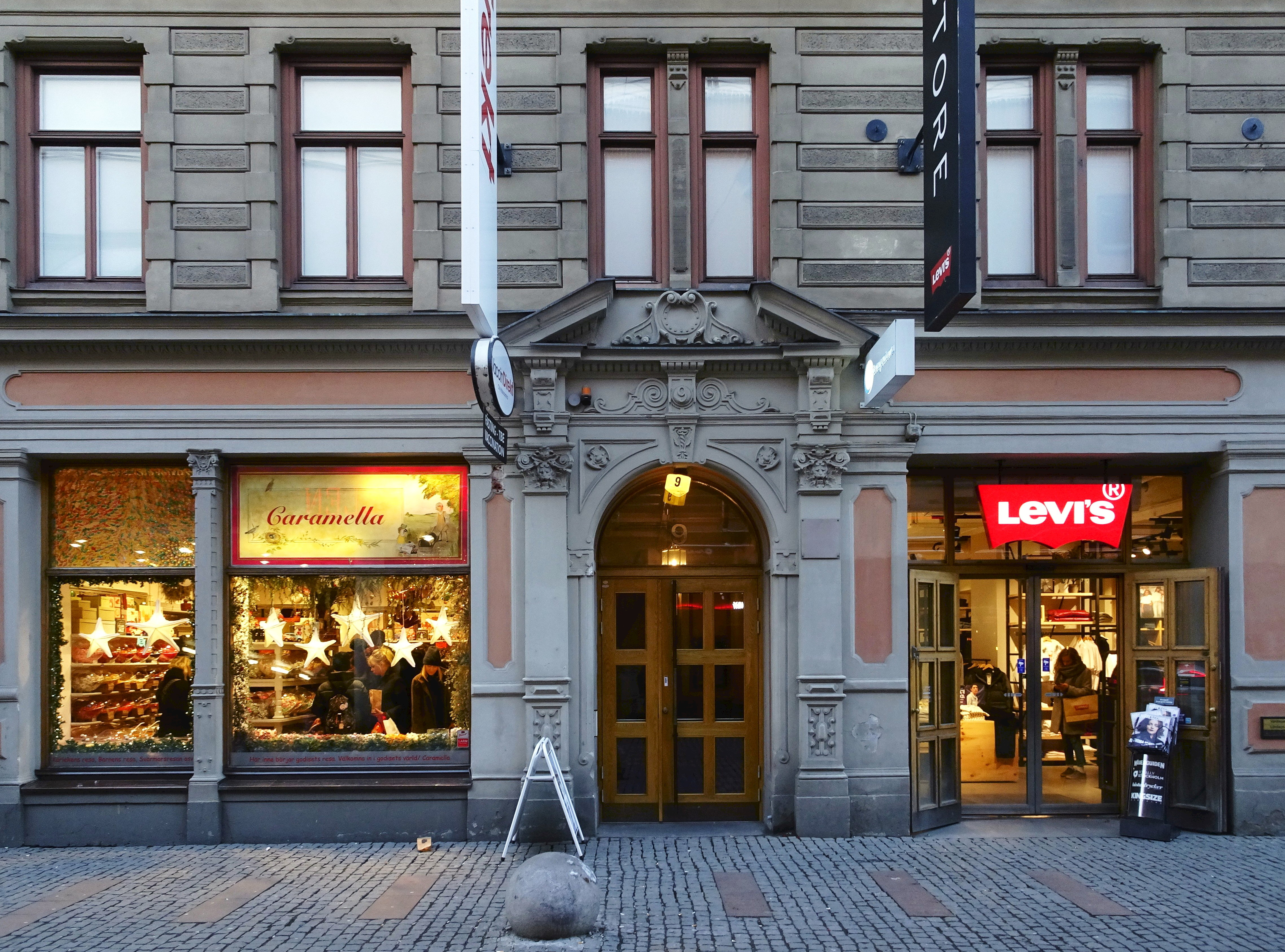 Slöjdgatan nr 9. År 1889 - 1891 Nybyggnad, Anders Gustaf Forsberg (Arkitekt) Nils Johan Bengtsson (Byggmästare) Nils Johan Bengtsson (Byggherre)